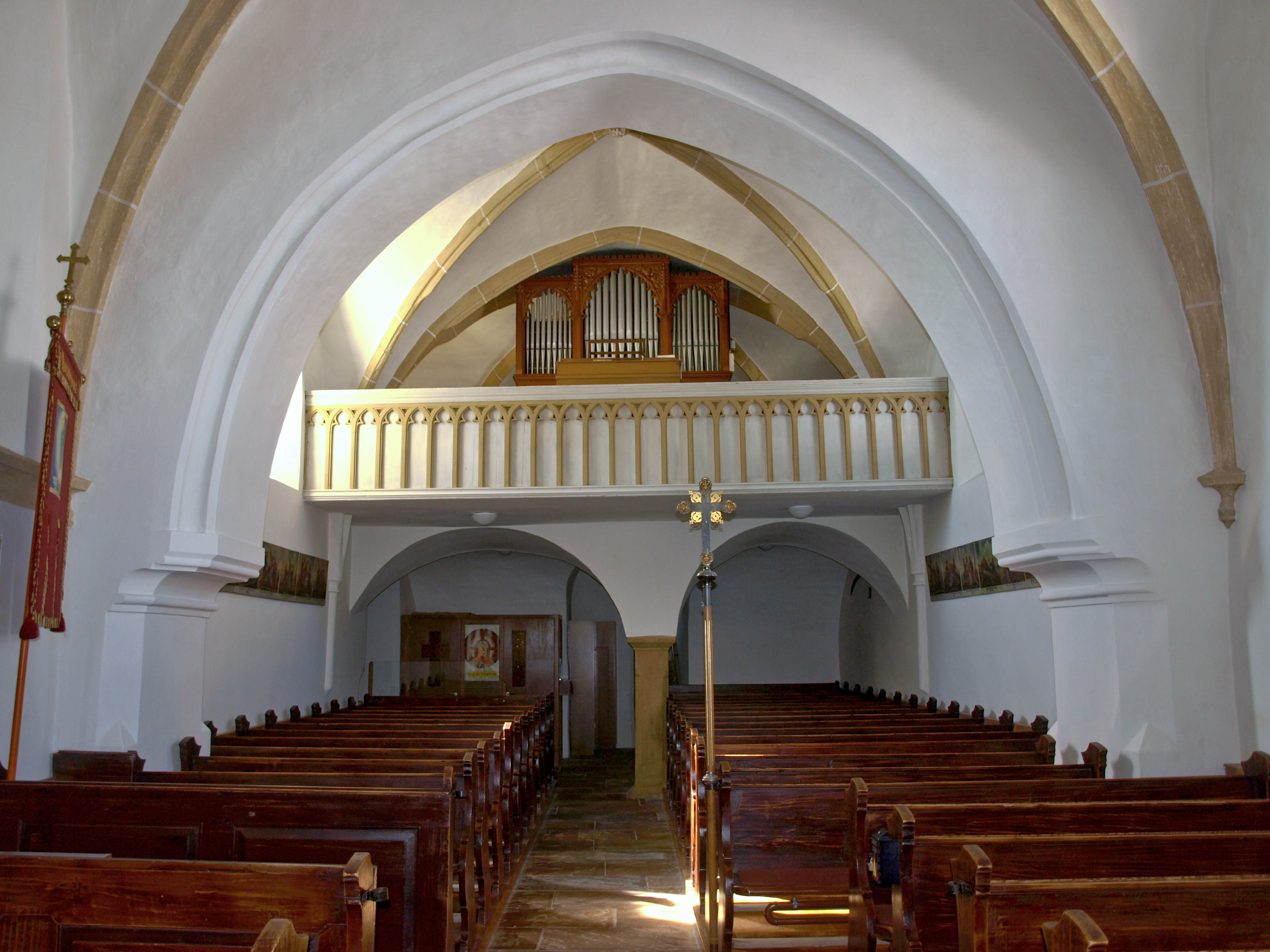 St.Georgen in der Klaus, Kath. Pfarrkirche hl. Georg